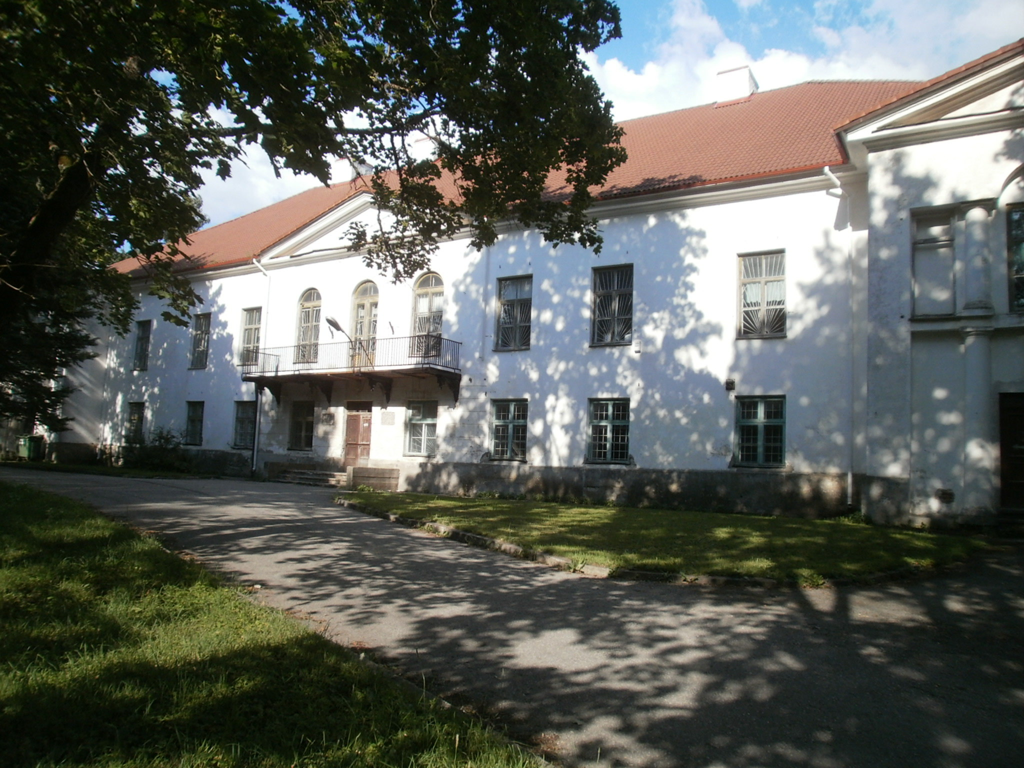 Kasti mõis. Vaade läänefassaadile. Lääneküljes asub praegu peasissekäik, kunagi on olnud see ka põhjaküljel vana trepi vastas. Mõisa ees asub ringtee ja park.